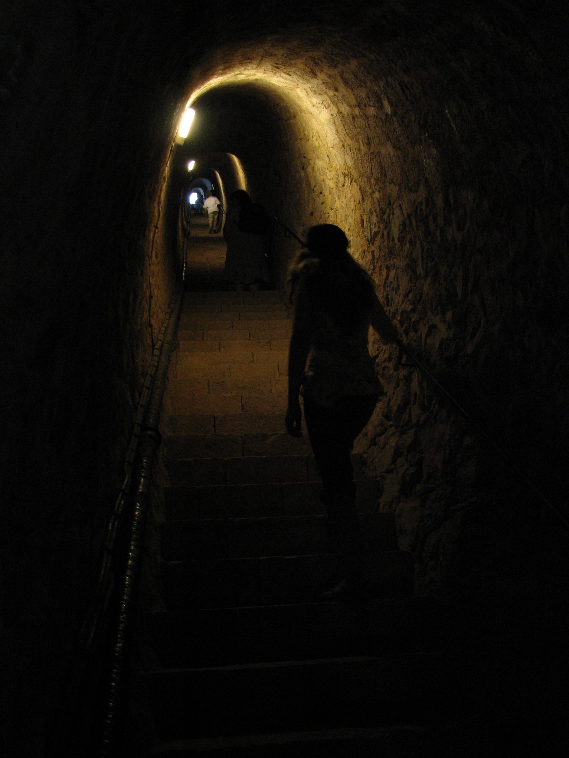 Fort Libéria: „Souterrain des «1000 Marches»“, unterierdischer Gang, Treppe mit 734 Stufen